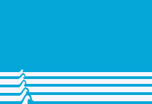 прапор смт Комишуваха